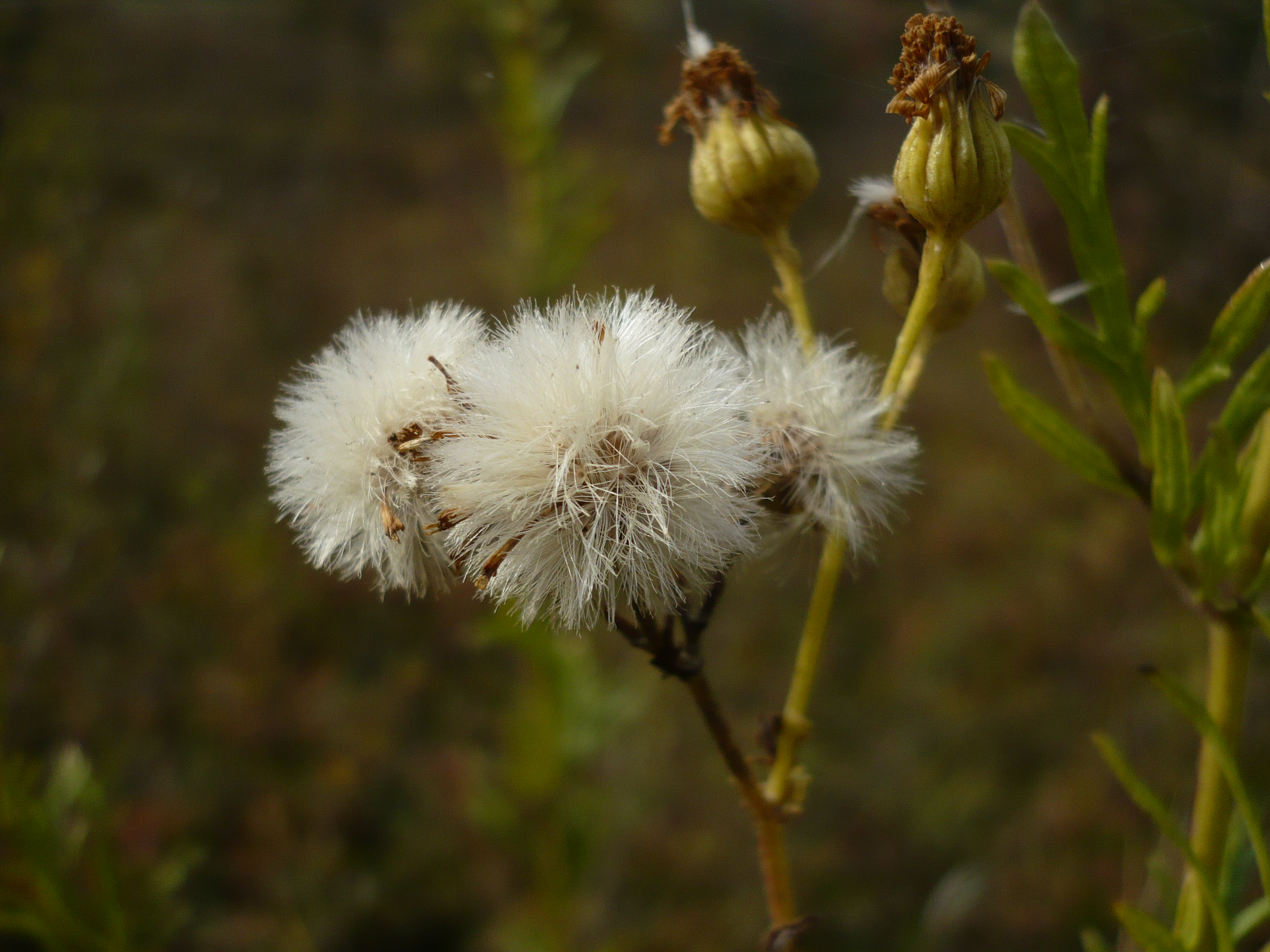 Астра ланцетная. Экопоселение Кореньские родники, Белгородская область.